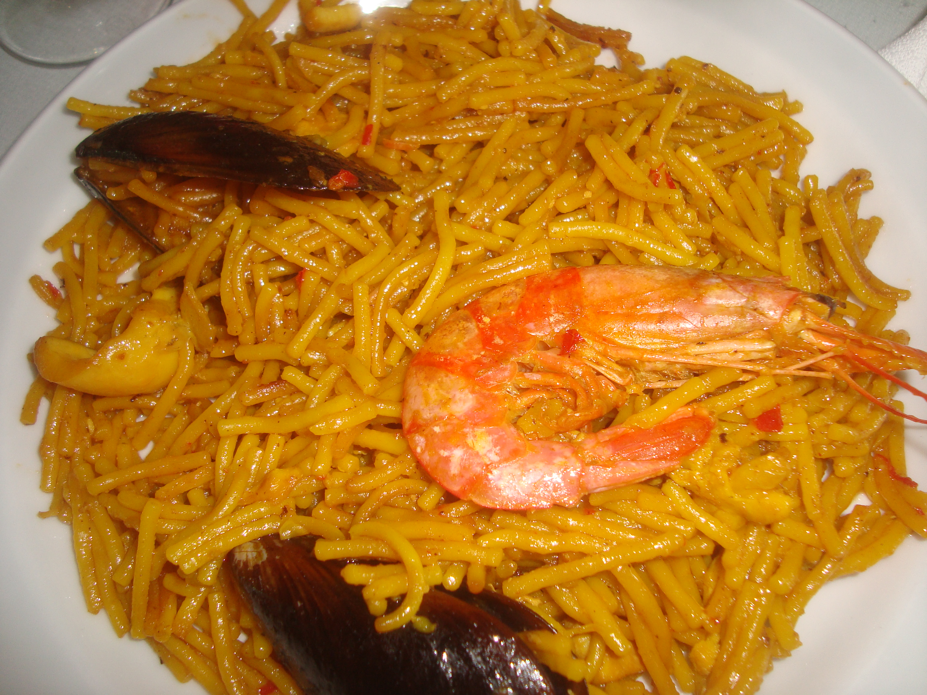 Plato de "fideuà".